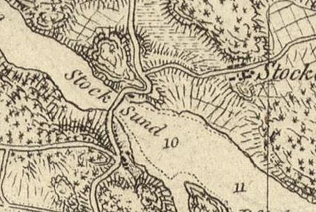 Stocksundet på del av karta över Stockholm med omgivning